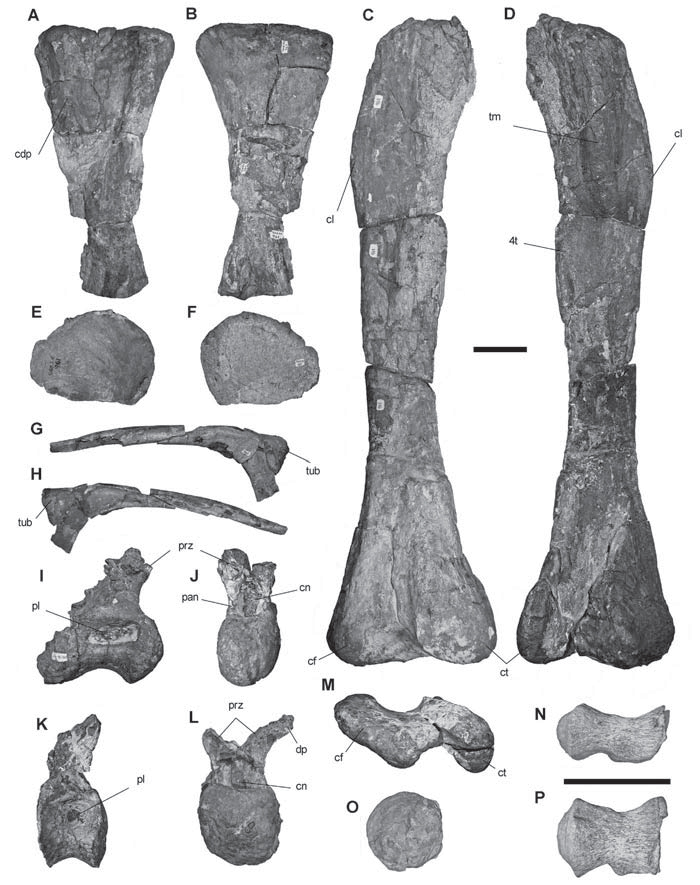 Atamatitan chilensis, holotipo proveniente de estratos de Formación Tolar (Cretácico Superior), El Abra, Región de Antofagasta. A) SGO.PV.961f húmero derecho carente de porción distal en vista anterior, B) SGO. PV.957 vista posterior; C) fémur derecho en vista anterior, D) vita posterior, M) vista distal; E) SGO.PV.961e placa esternal en vista dorsal?, F) vista ventral?; G) SGO.PV.961d costilla en vista anterior, H) vista posterior; I) SGO. PV.961a, vértebra dorsal en vista lateral derecha, J) vista craneal; K) SGO.PV.961b, vértebra dorsal en vista lateral derecha, L) vista craneal; O) fragmento articular de centro vertebral asociado en vista posterior; N) SGO.PV.961c, vértebra caudal en vista ventral, P) vista ventrolateral. Abreviaciones anatómicas: 4t, cuarto trocánter; cap, capitulum; cdp, cresta deltopectoral; cf, cóndilo fibular; cl, comba lateral; cn, canal neural; ct, cóndilo tibial; dp, diapófisis; pan, pedúnculo de arco neural; pl, pleurocelo; prz, prezigapófisis; tm, tubérculo mayor; tub, tuberculum. Barra de escala para A-M , O = 10 cm. Barra de escala para N, P = 5 cm.